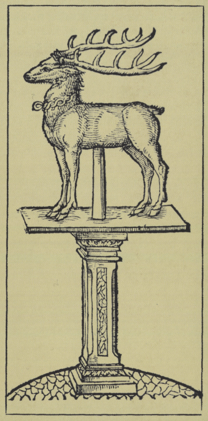 Abbildung der historischen Hirschsäule auf dem Altén Markt in Magdeburg